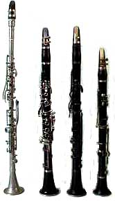 Klarinetten uit eigen verzameling